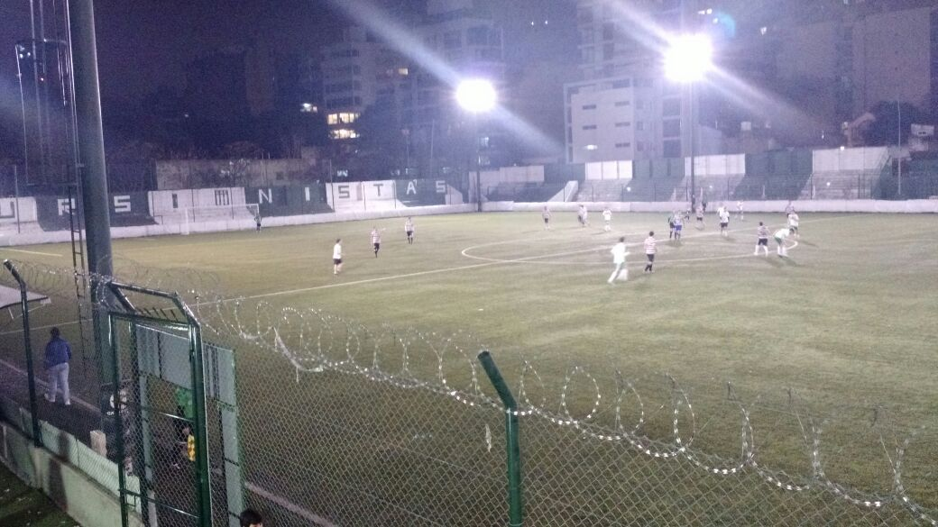 estadio de excursionistad de noche